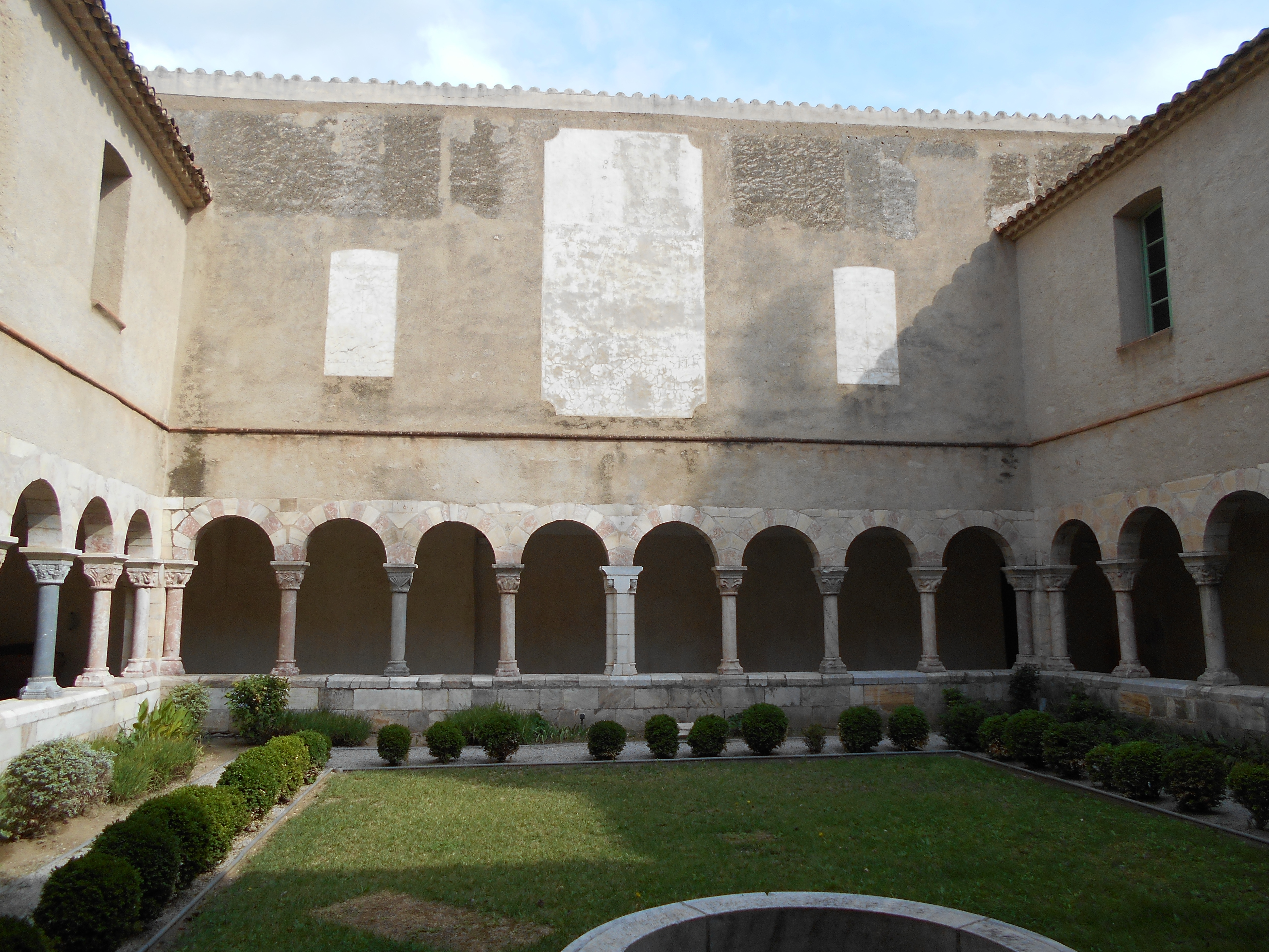 Galeria septentrional del claustre de Sant Genís de Fontanes